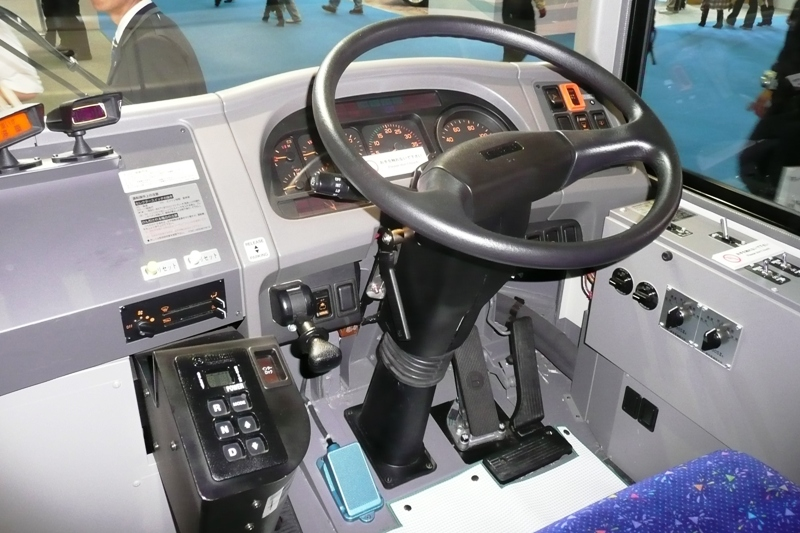 Isuzu Erga interior.